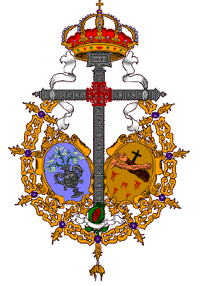 Escudo Oficial de la Muy Antigua, Real e Ilustre Hermandad Sacramental del Santísimo Cristo de San Agustín, Jesús Nazareno de las Penas, Nuestra Madre y Señora de la Consolación y Santo Ángel Custodio.